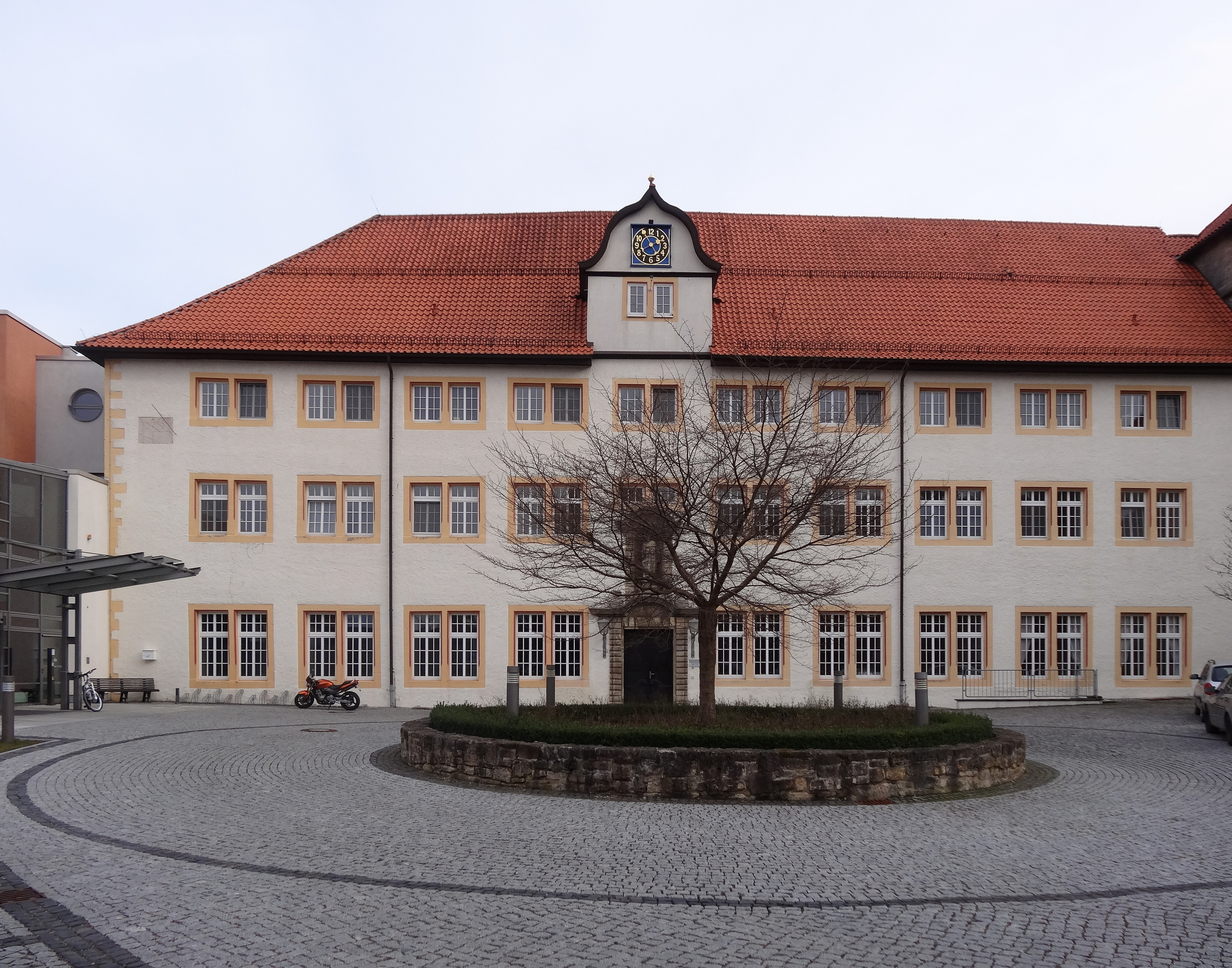 Hauptgebäude des Eichsfeldklinikums in Reifenstein, Thüringen